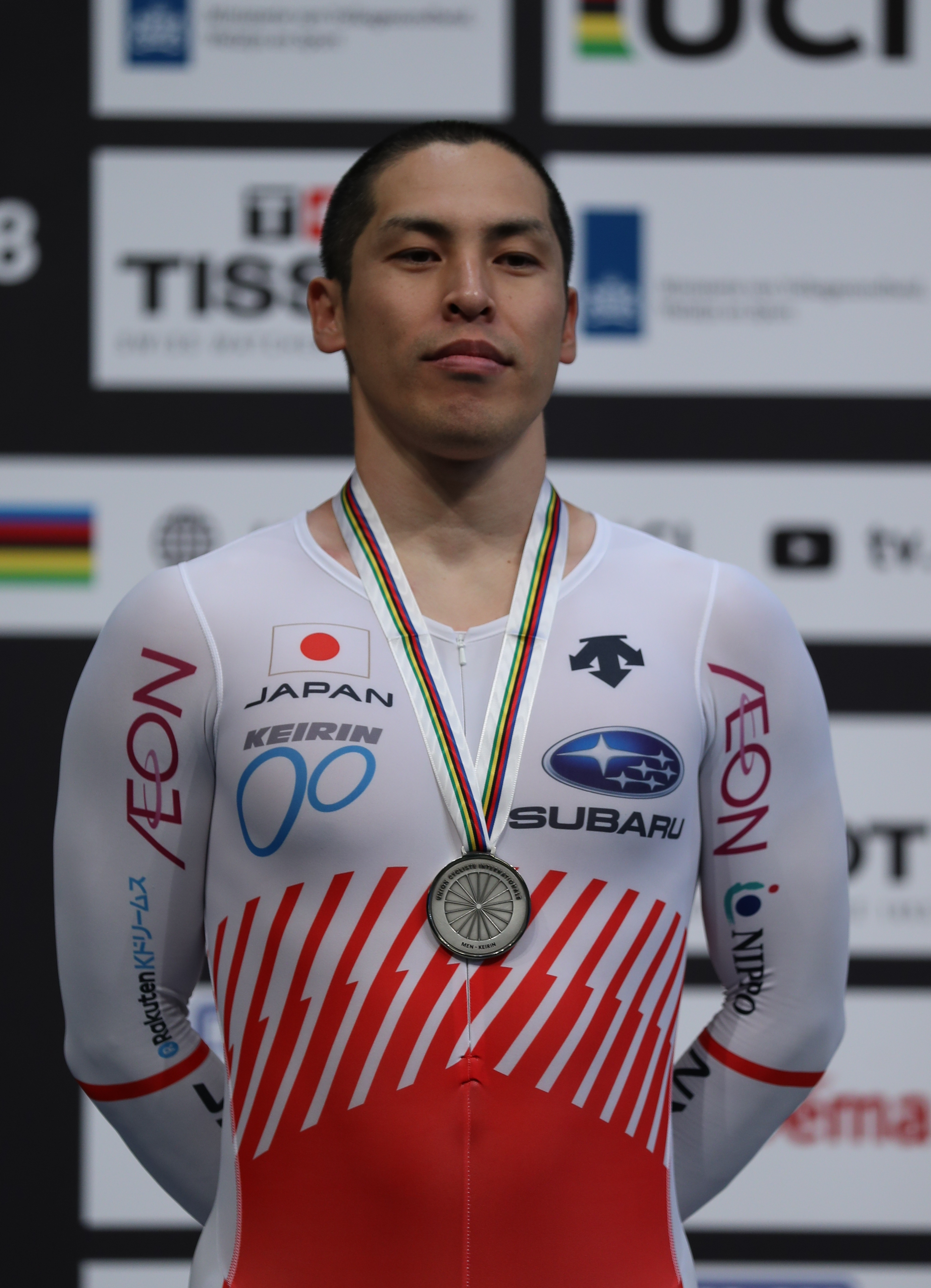 Tomoyuki Kawabata, Silber im Keirin